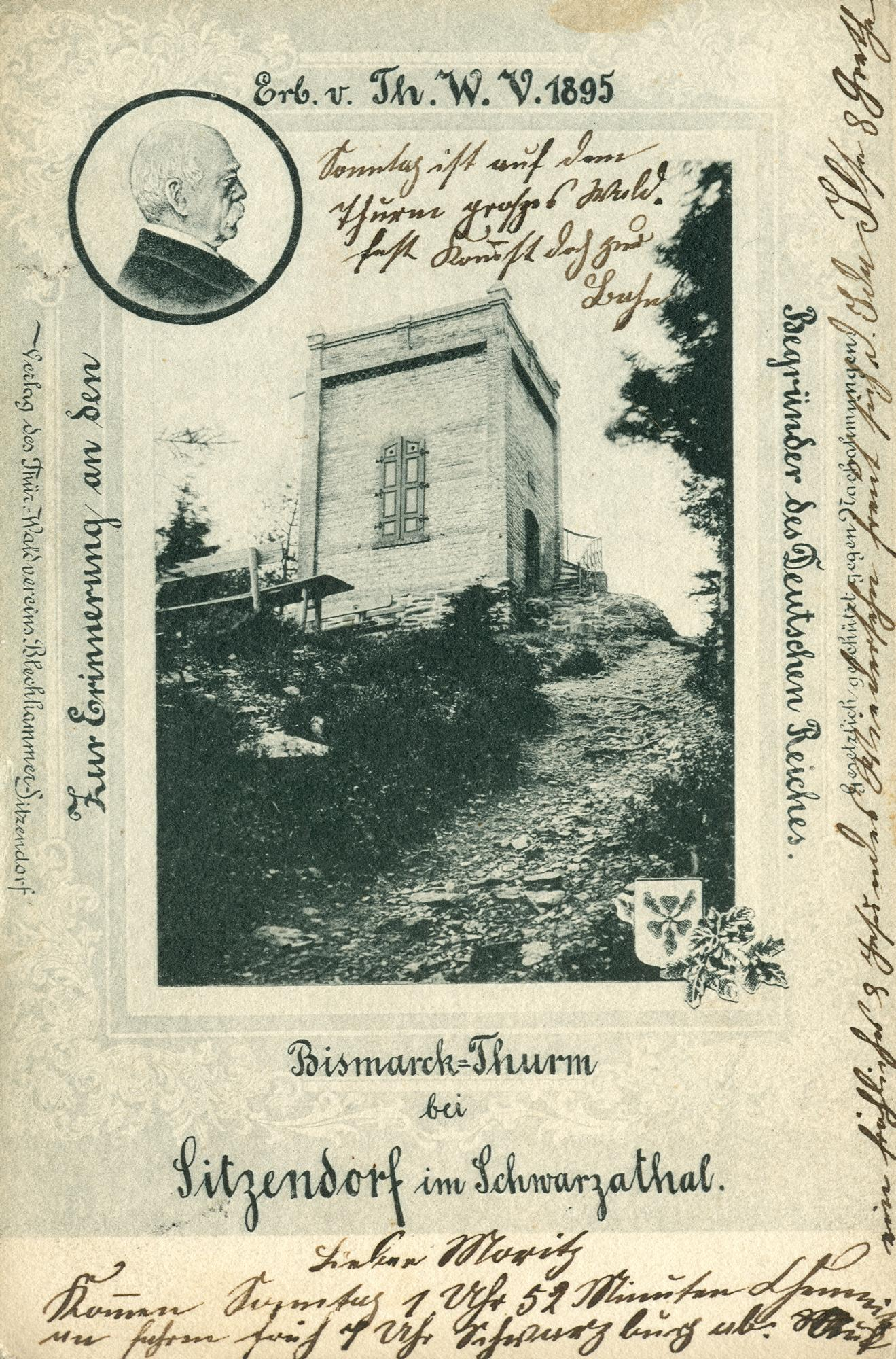 Bismarckturm Sitzendorf/Thür.